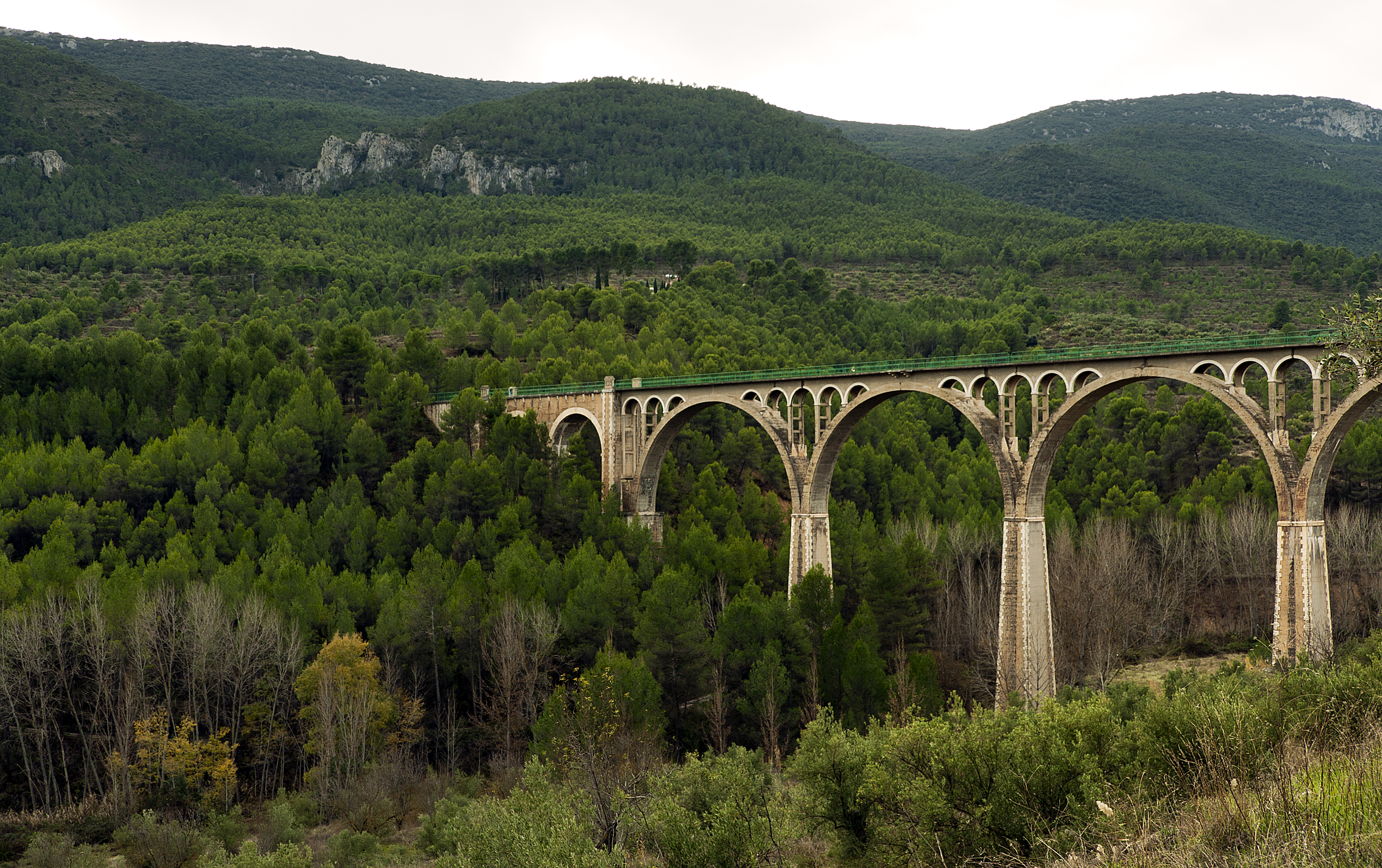 Pont de les Set Llunes España, Alcoy